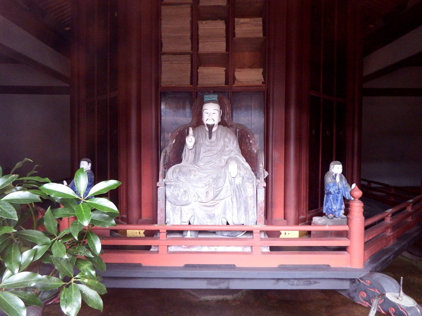 丈六寺の大経蔵